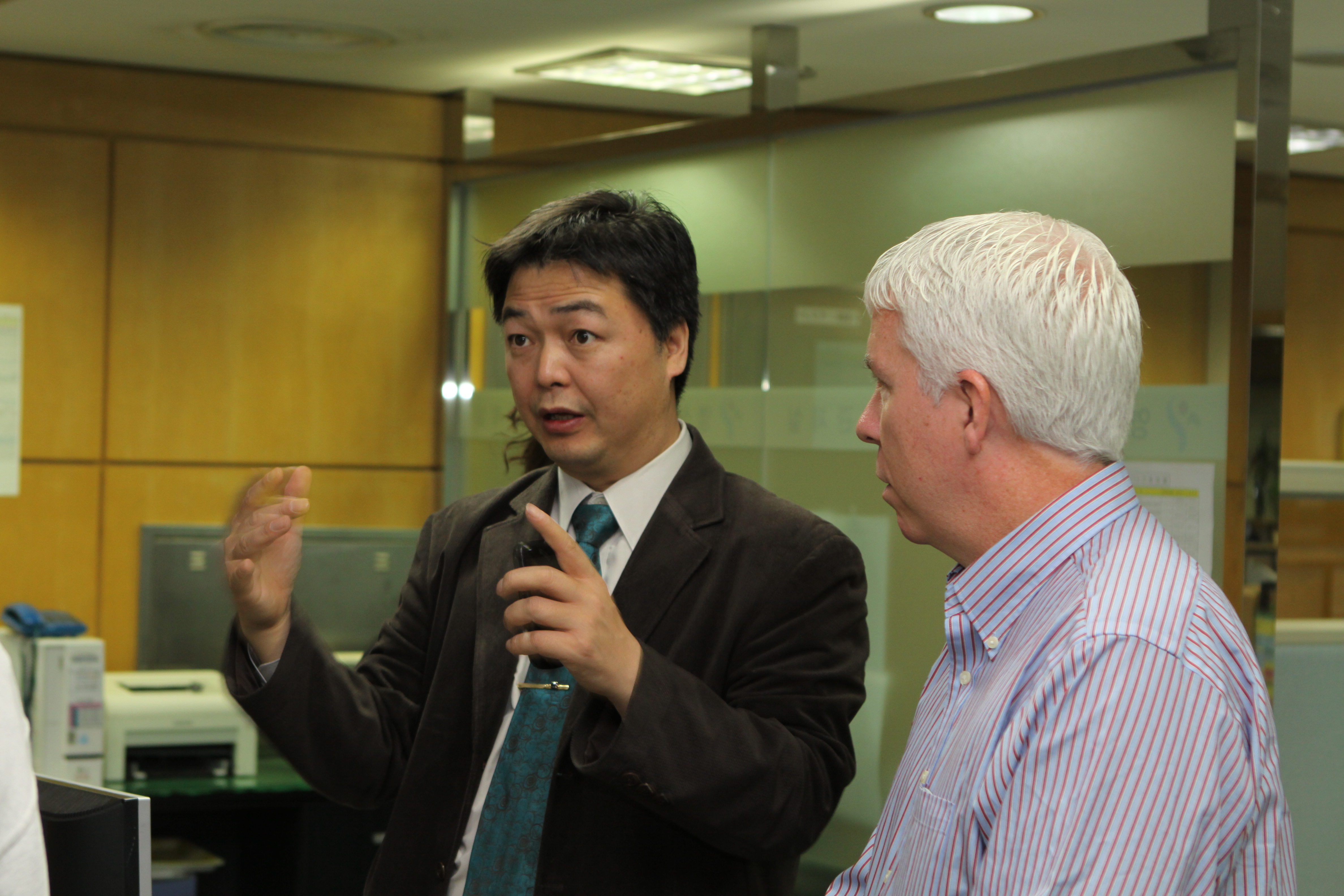 20120405신상도 교수 일행 서울종합방재센터 방문